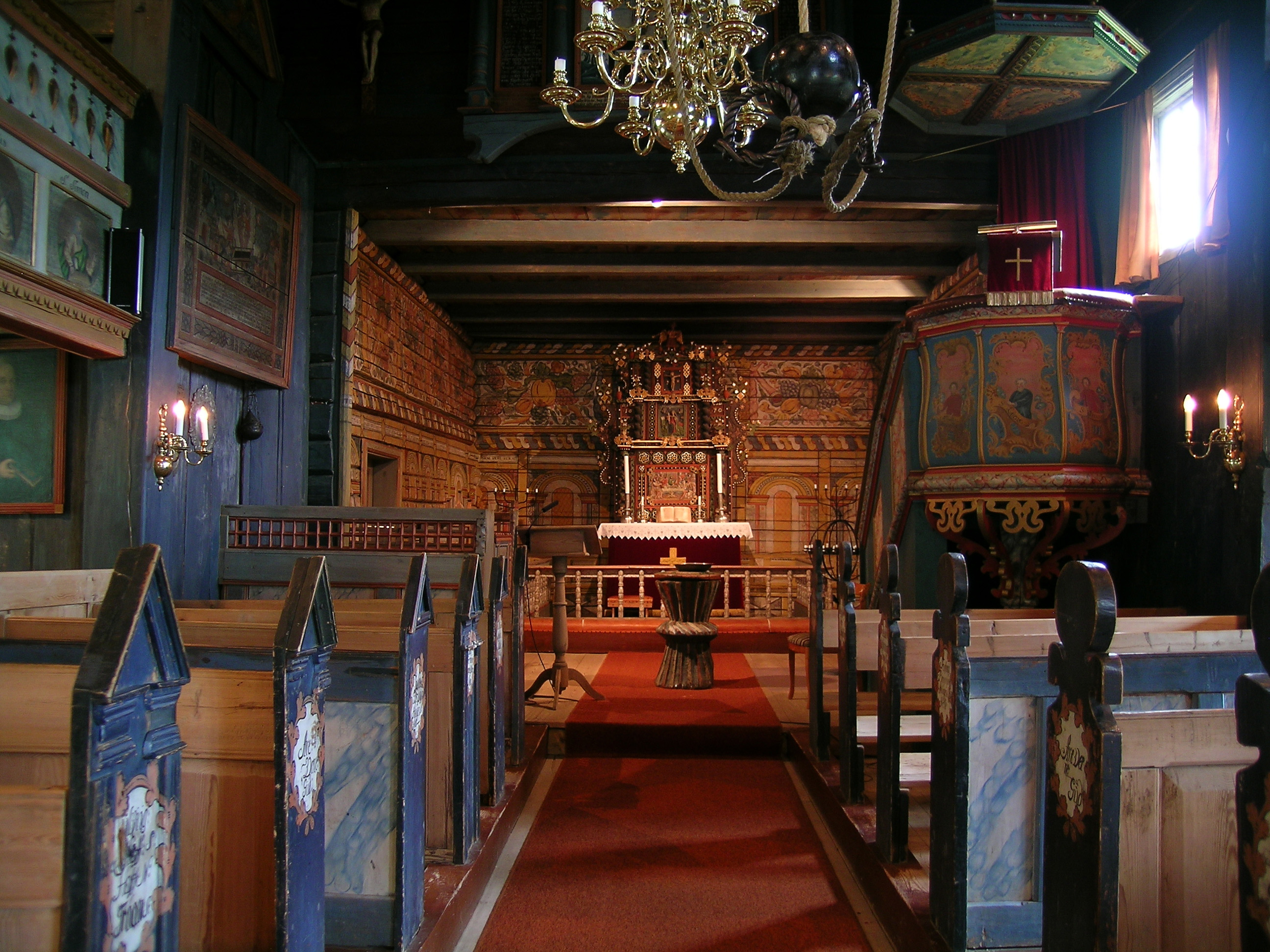 Rollag stave church. Rollag, Buskerud.